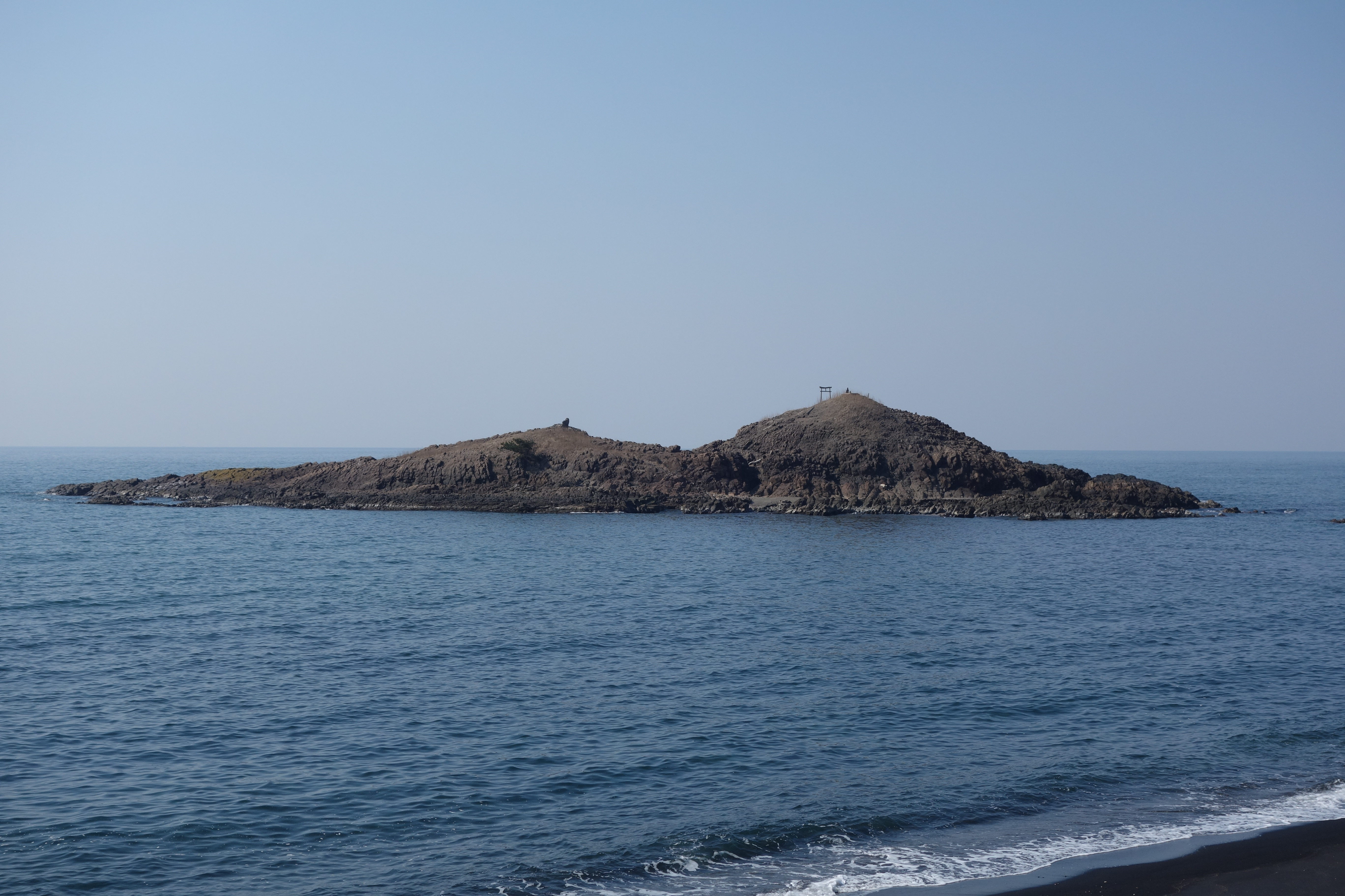 八峰町の沖にある孤島の雄島(おしま)